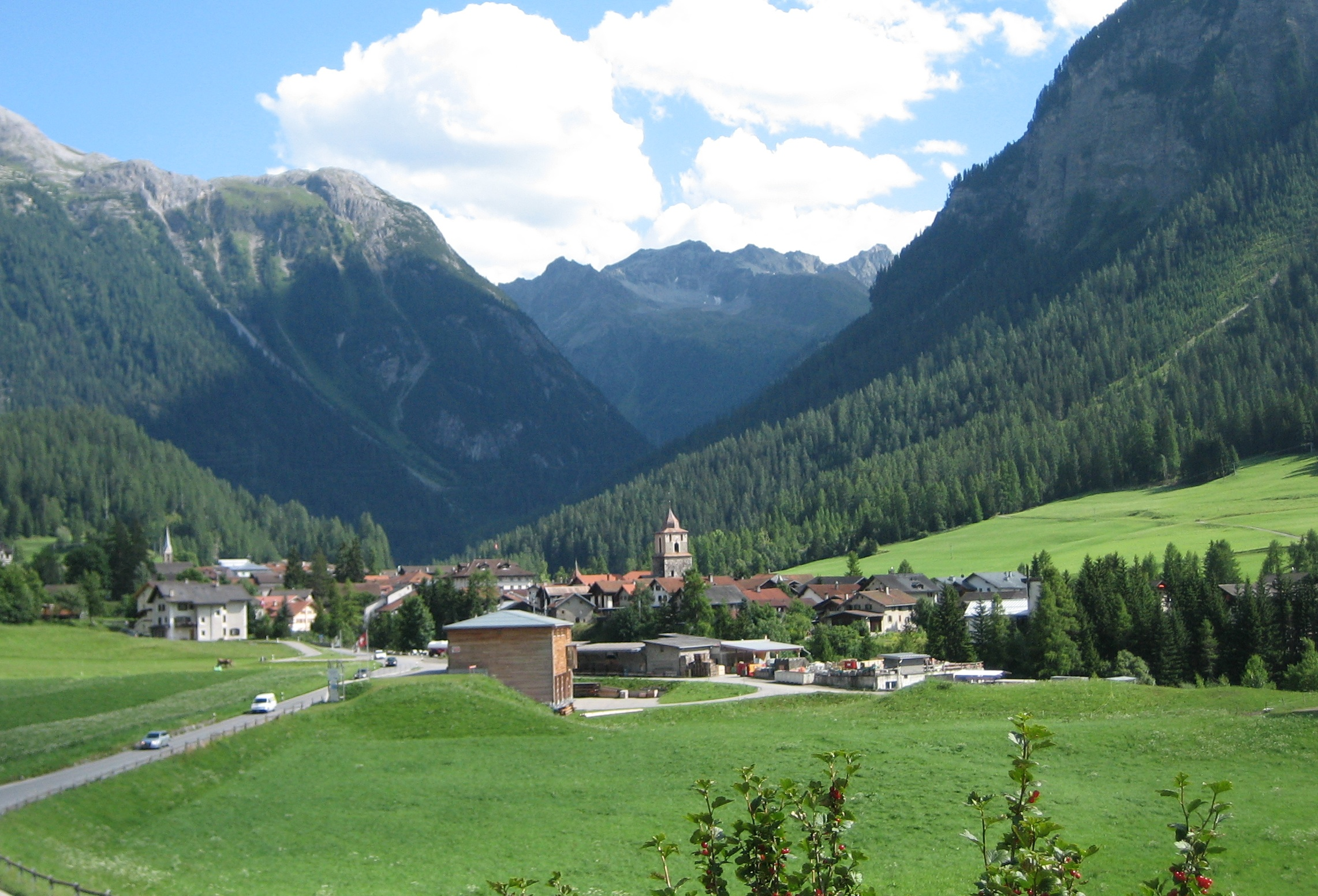 Bergün